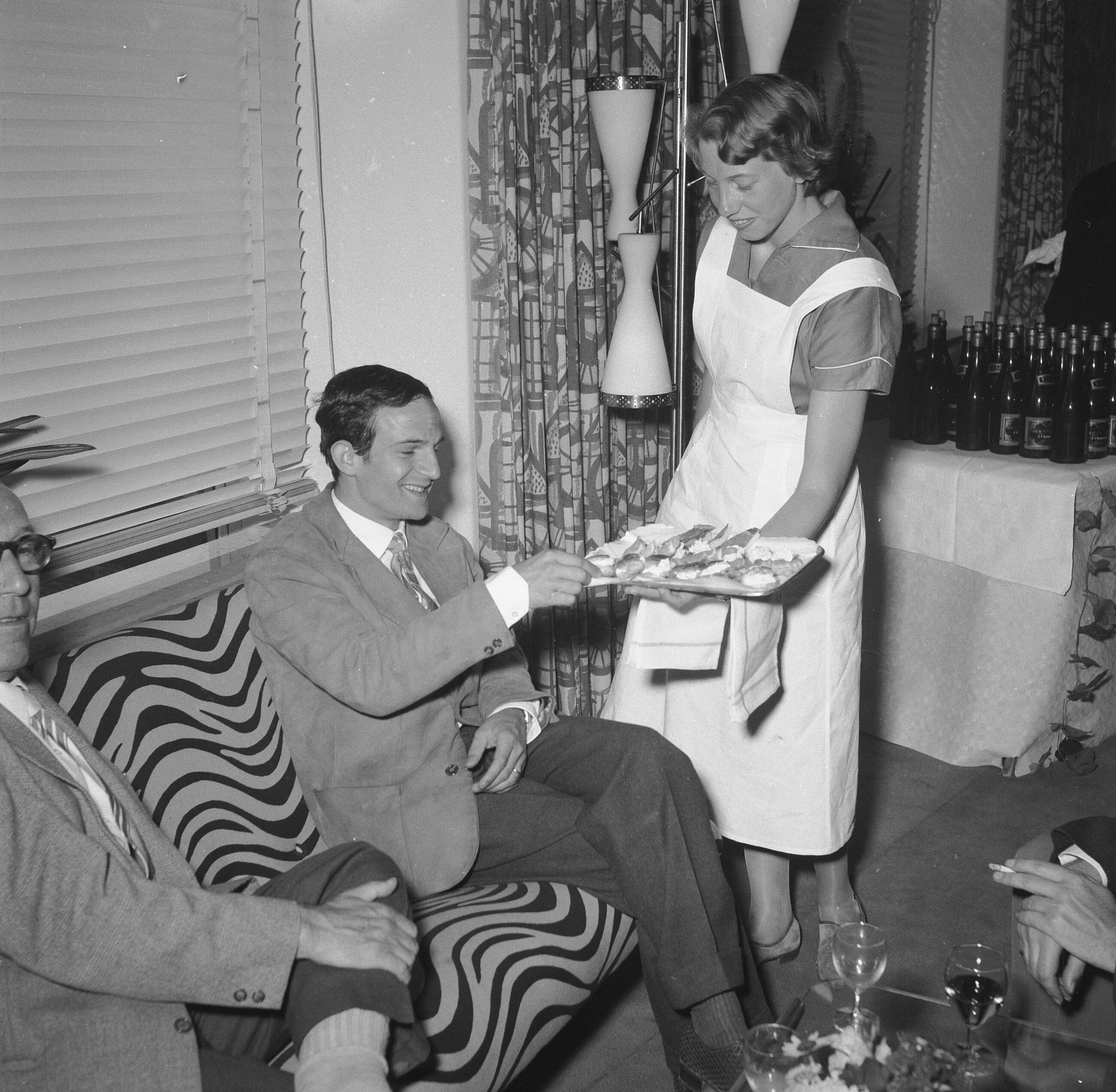 Collectie / Archief : Fotocollectie Anefo Reportage / Serie : [ onbekend ] Beschrijving : Cocktailparty t.g.v. officiële opening Filmweek Arnhem. de regisseur Francois Truffaut wordt bediend door een der leerlingen van een nijverheidsschool Datum : 19 juni 1959 Locatie : Arnhem Trefwoorden : film, filmregisseurs, leerlingen, party's Persoonsnaam : Truffaut, François Fotograaf : Noske, J.D. / Anefo Auteursrechthebbende : Nationaal Archief Materiaalsoort : Negatief (zwart/wit) Nummer archiefinventaris : bekijk toegang 2.24.01.03 Bestanddeelnummer : 910-4556